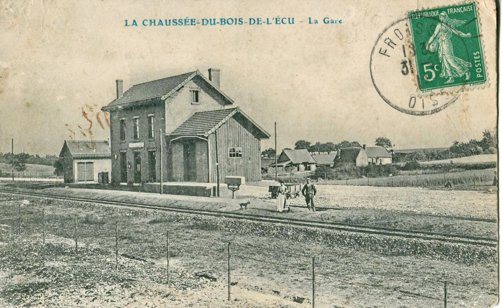 Carte postale ancienne, sans mention d'éditeur : LA CHAUSSEE DU BOIS DE L'ECU : La Gare.Ligne Estrées-Saint-Denis - Froissy - Crèvecœur-le-Grand